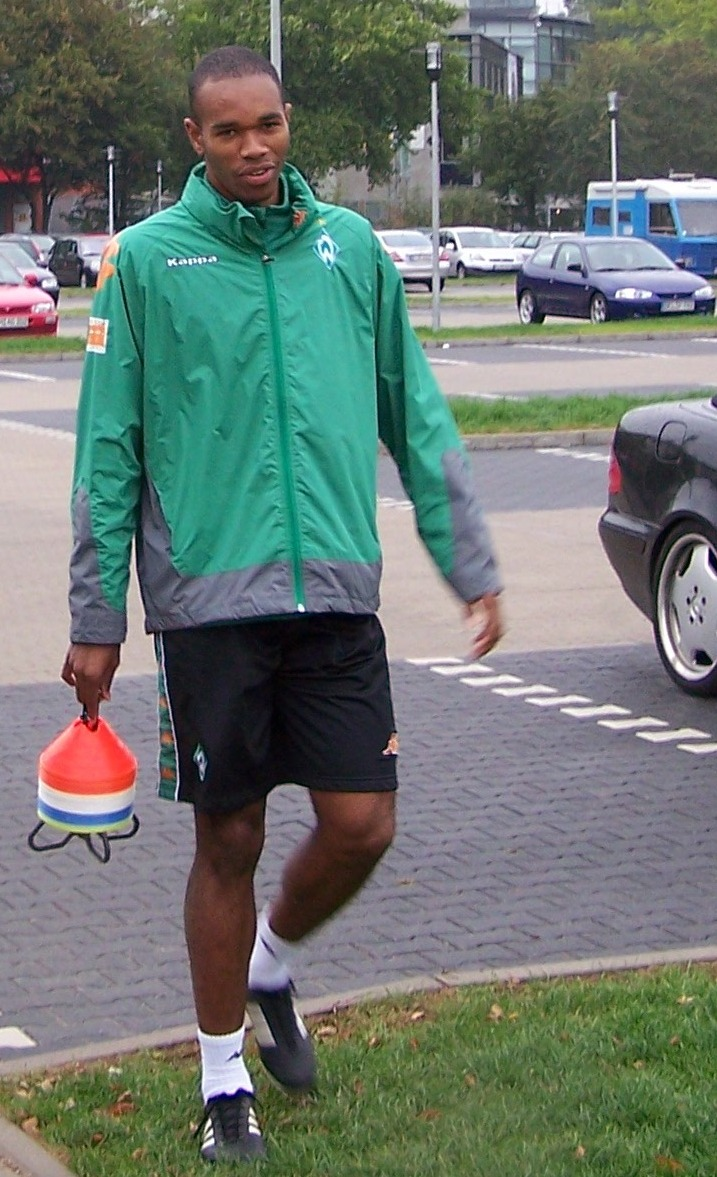 Naldo